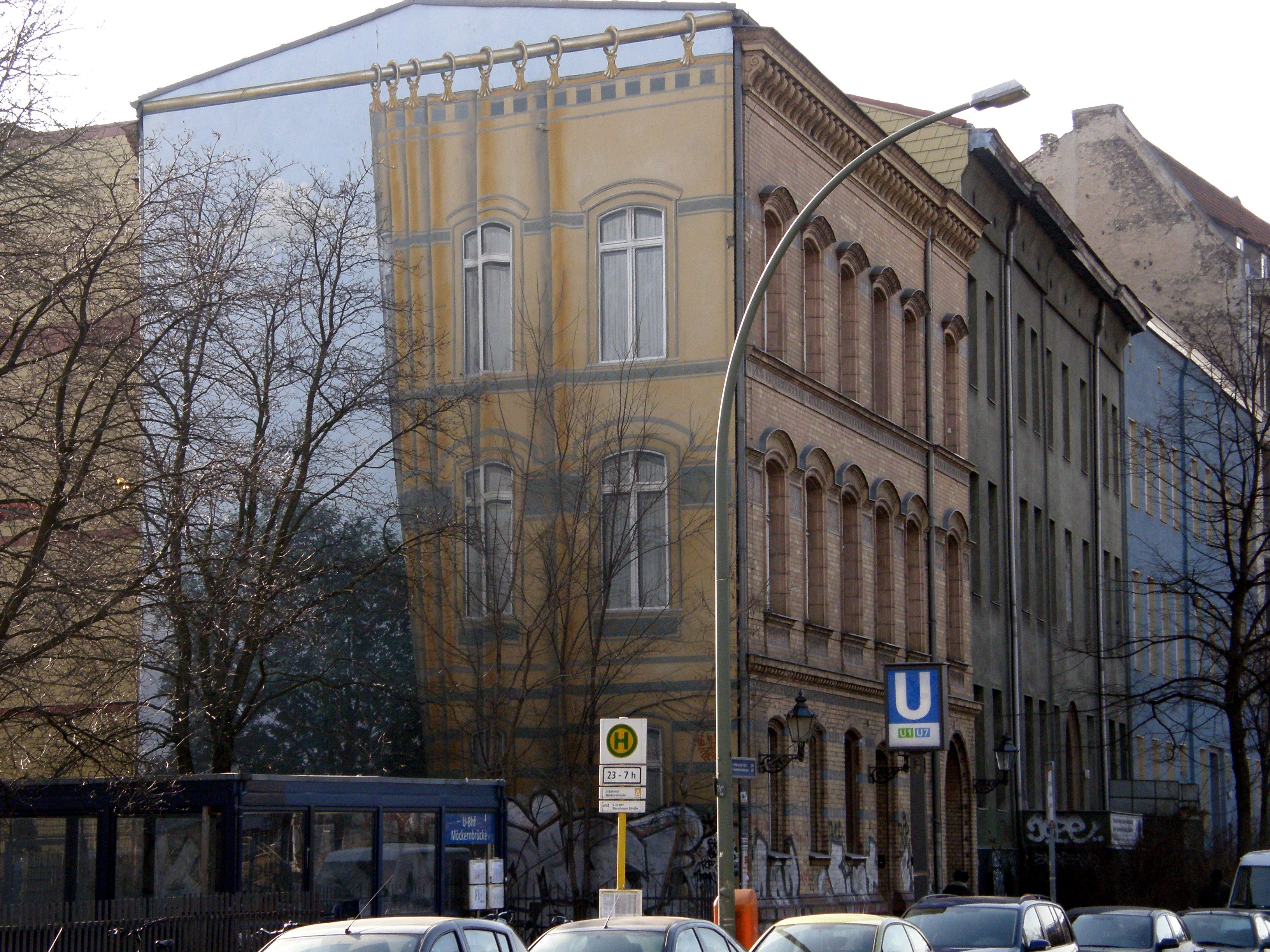 Straße in Kreuzberg, Fassadenbild von Irene Niepel